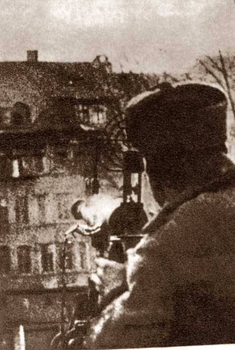 likwidacja oporu Niemców na Łazarzu